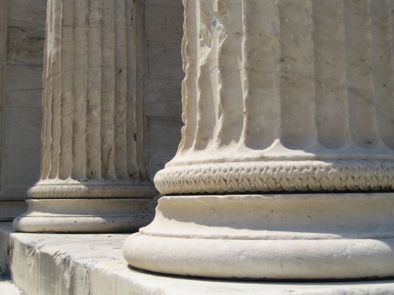 Basa de columna griega